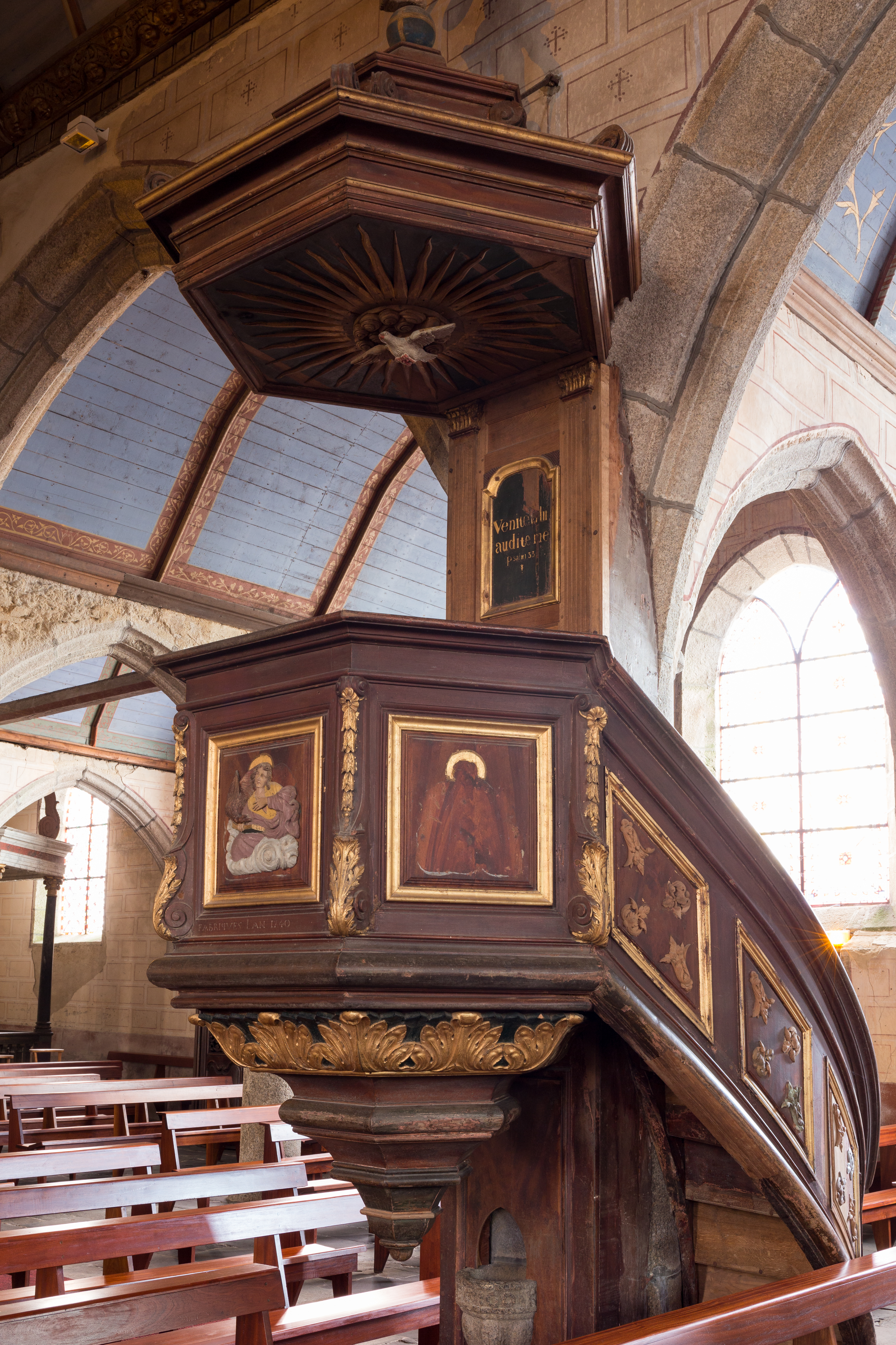 Iliz Sant-Pêr Pleiber-Krist: ar gador-brezeg.